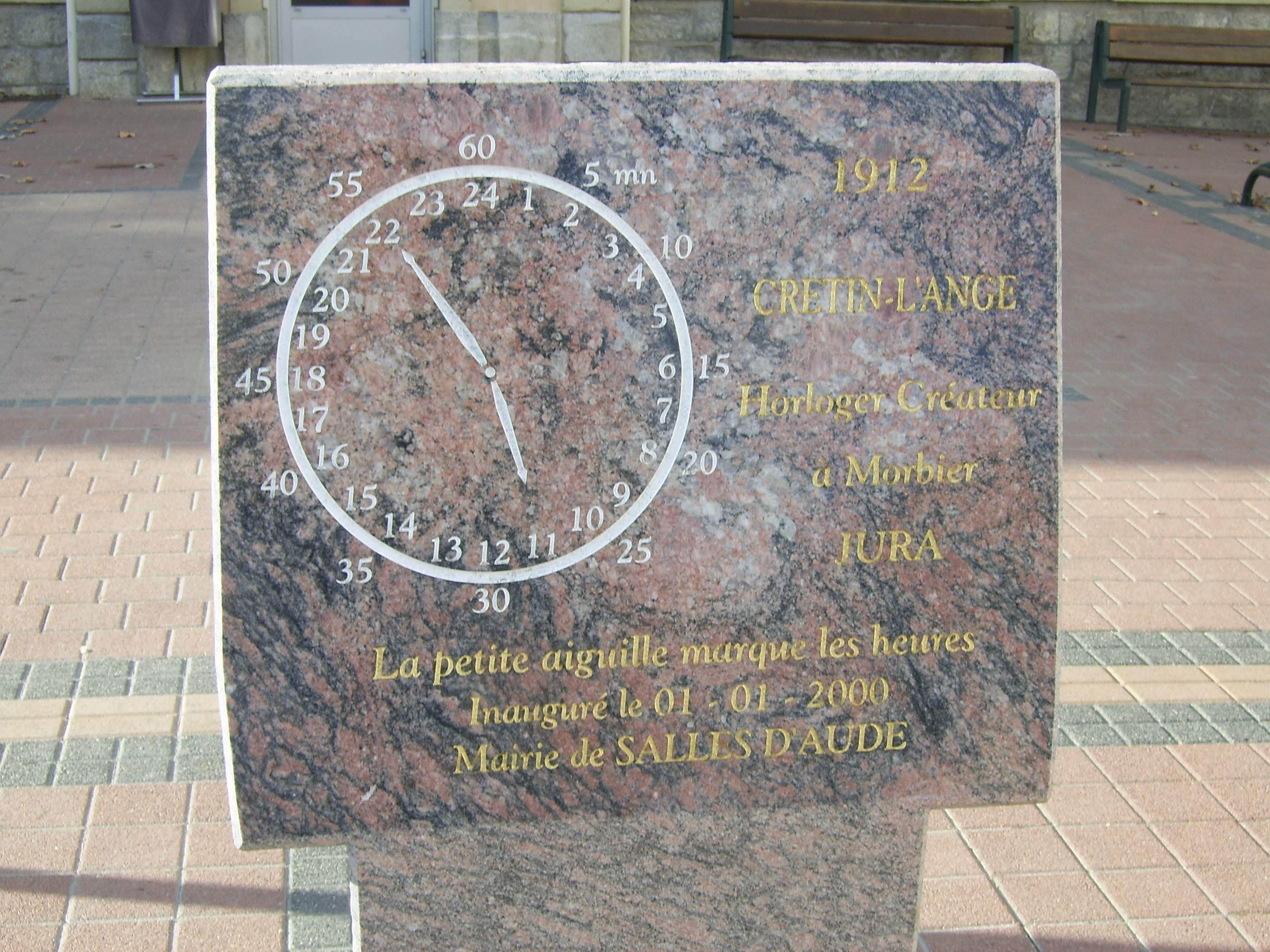 Table explicative pour la lecture de l’horloge avec cadran 24 heures, de la mairie de Salles-d’Aude